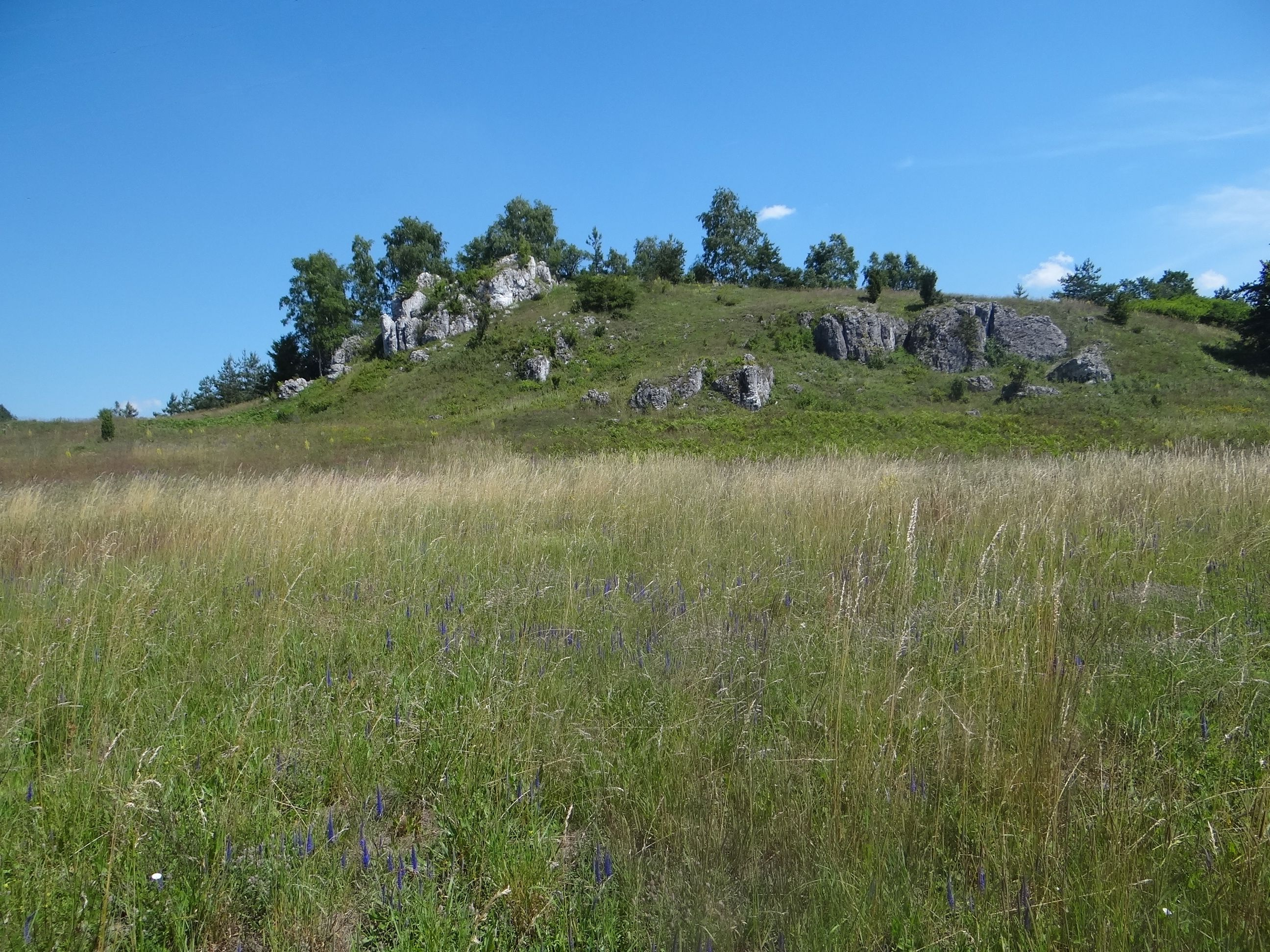 Wzgórze Babia Góra w Ryczowie